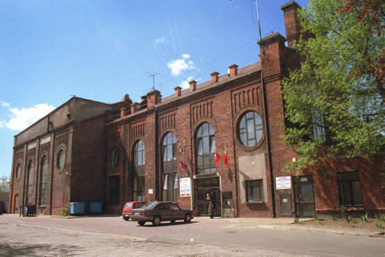 Radom - dawna elektrownia wzniesiona w 1903r. Obecnie Muzeum sztuki współczesnej